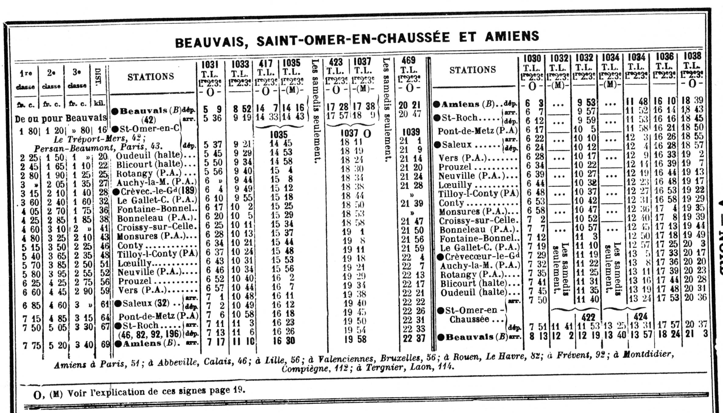 Tableau horaire de la ligne Beauvais - Amiens